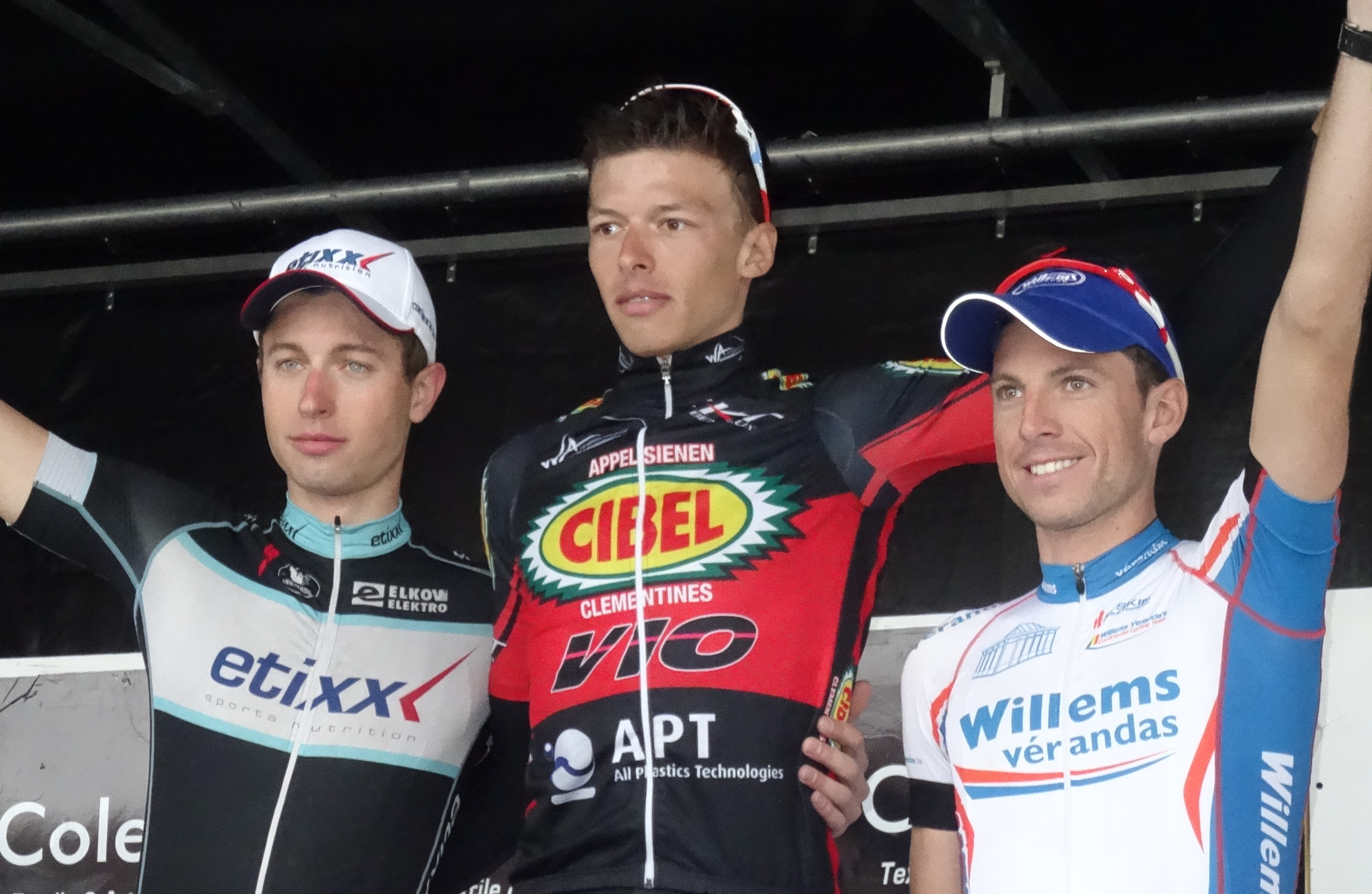 Reportage photographique réalisé le samedi 30 août à l'occasion du départ et de l'arrivée du Grand Prix des commerçants de Templeuve 2014 à Templeuve (Tournai), Belgique.